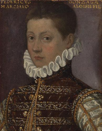 Federico Gonzaga di Luzzara